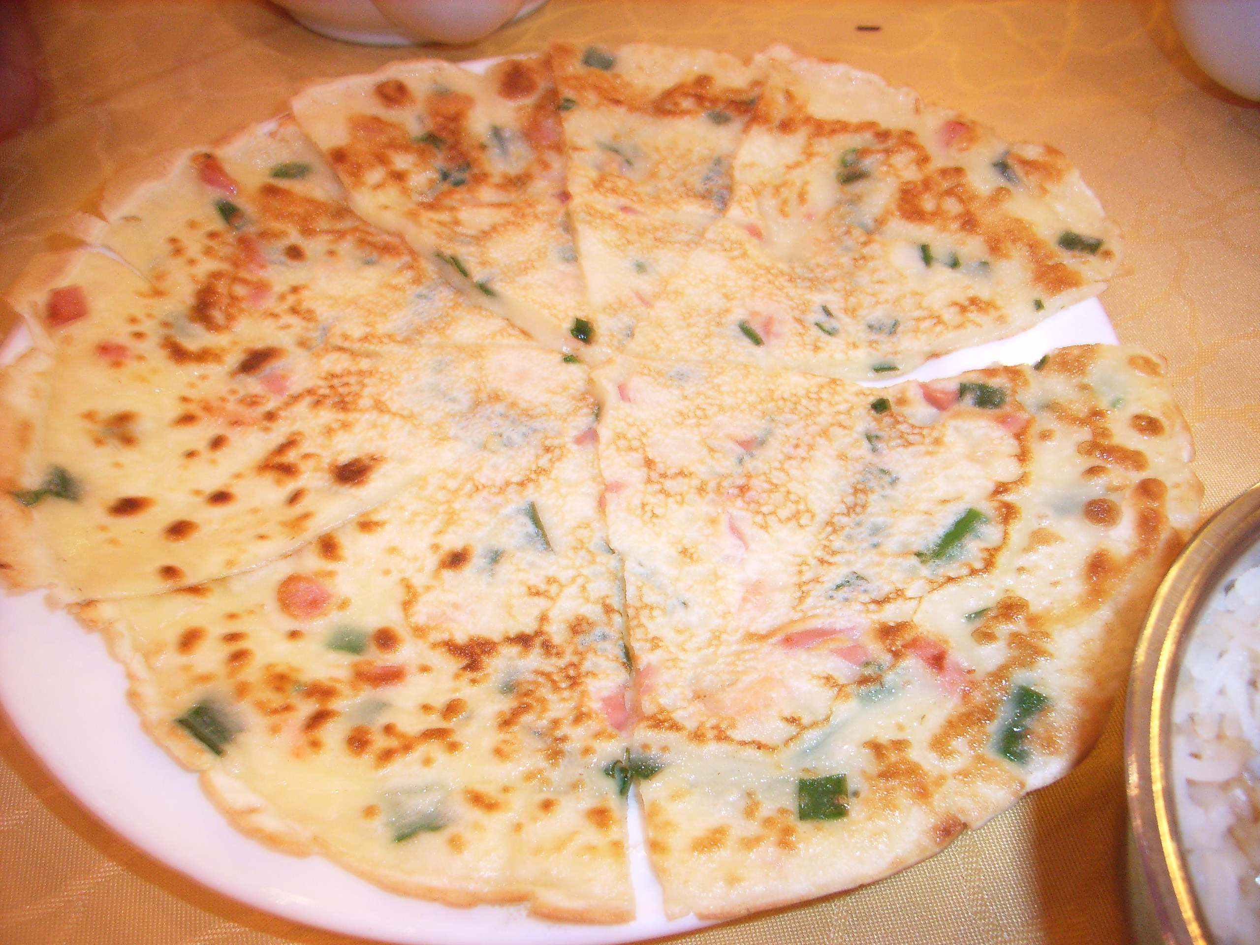 廣東家鄉煎薄罉: 材料zh:糯米粉及zh:粘米粉, 比例大約2:1 成份: 韮菜, 蝦米, 水, 鹽, 胡椒粉等. Author of photo: me.